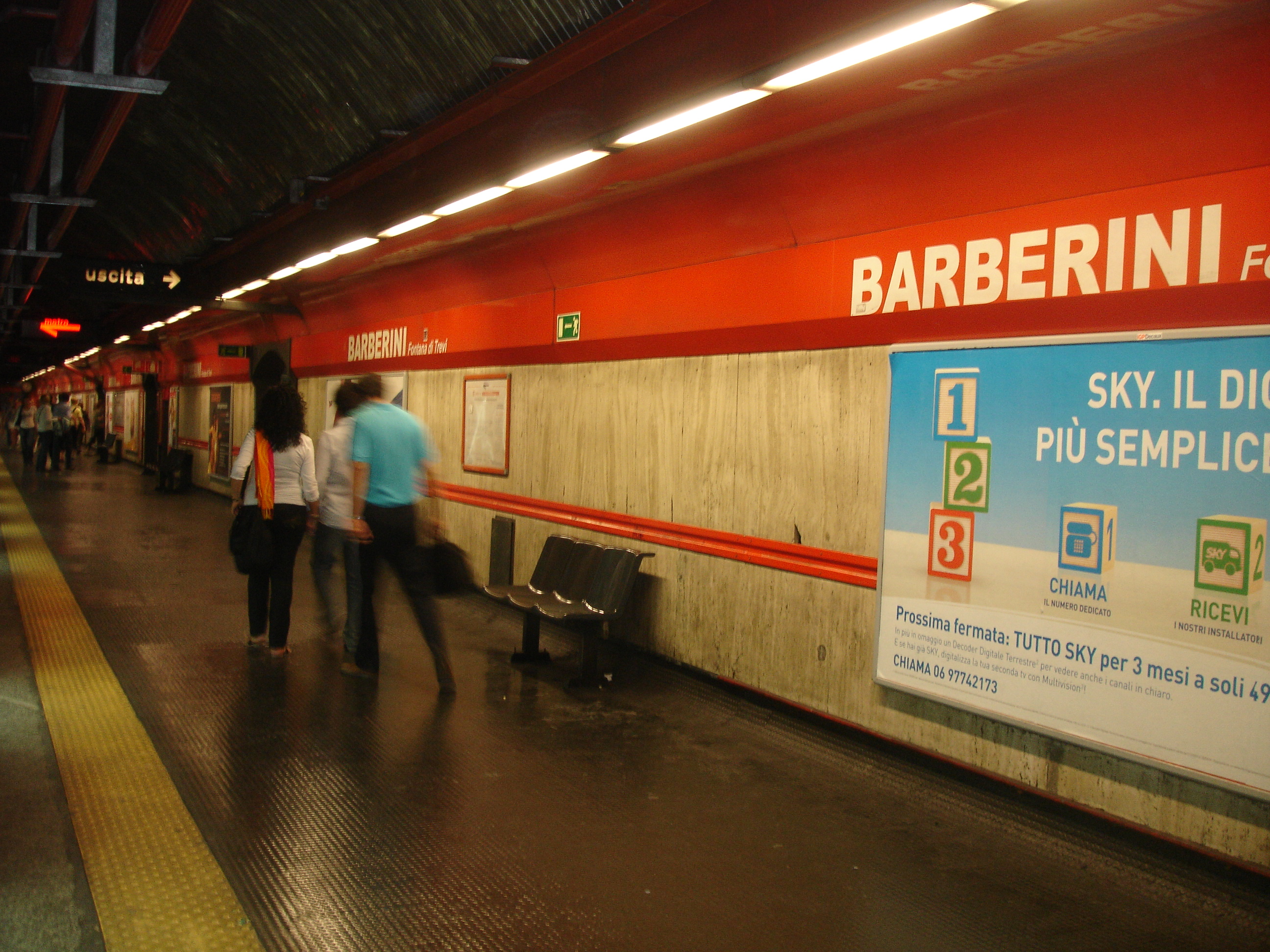 Uno scorcio della stazione Barberini-Fontana di Trevi.